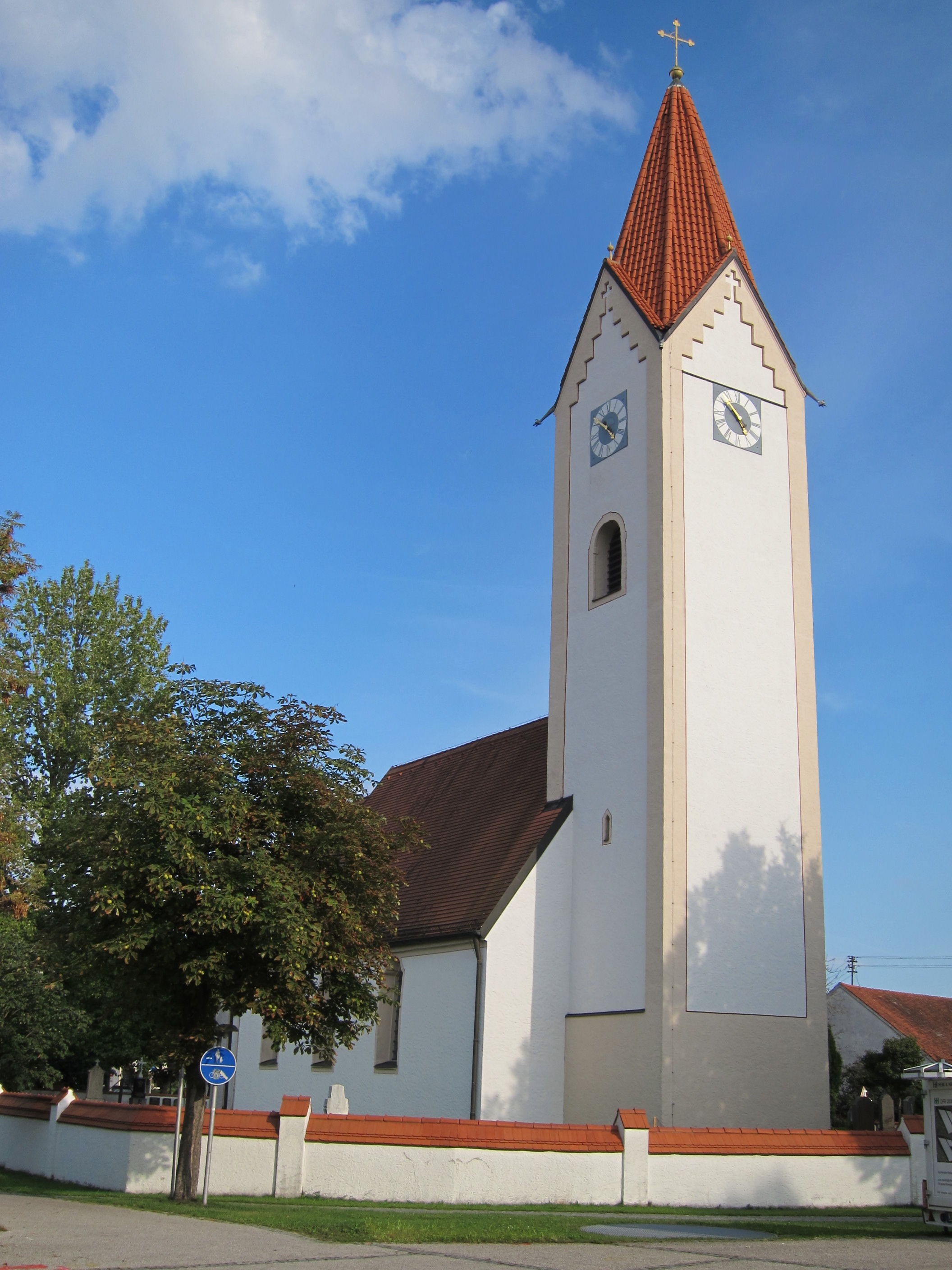 Untere Hauptstraße 3a, Kath. Pfarrkirche St. Andreas